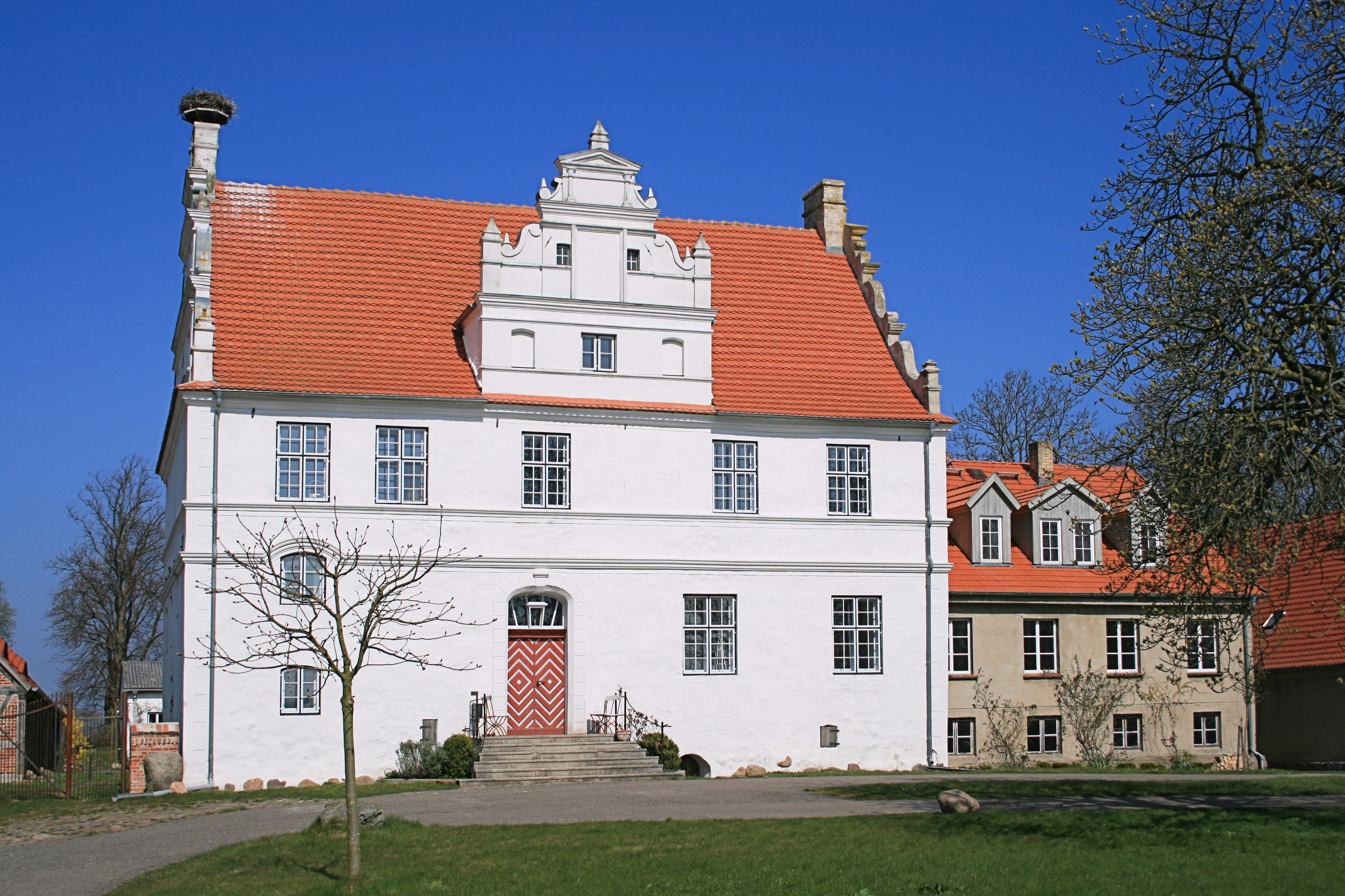 Das Gutshaus Venz befindet sich im Ortsteil Venz der Gemeinde Trent auf der Insel Rügen. Der 1486 erstmals erwähnte Hof Venz wurde 1583 von Jürgen von Platen auf Granskevitz durch Tausch erworben. Ende des 16. Jahrhunderts wurde im Auftrag von Georg von Platen das Gutshaus errichtet, das zum Ende des 17. Jahrhunderts seine heutige Gestalt erhielt. Das Gutshaus blieb bis 1924, bis auf kurze Unterbrechungen, im Besitz der Adelsfamilie von Platen.